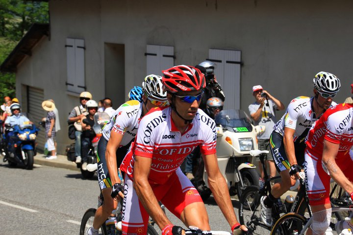 David Moncoutié dans le col d'Aspect